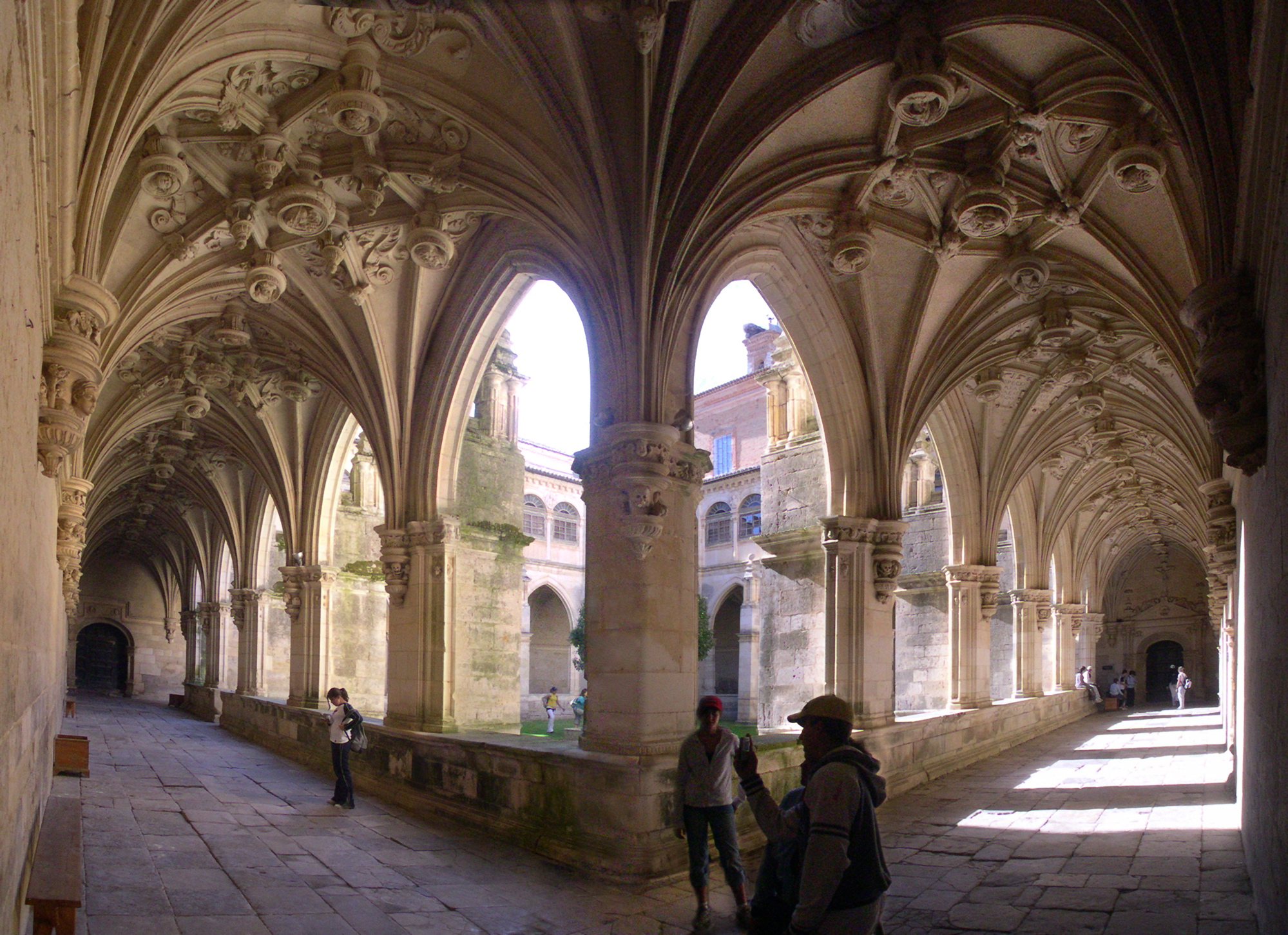 Claustro plateresco del monasterio benedictino de San Zoilo, en Carrion de los Condes Palencia